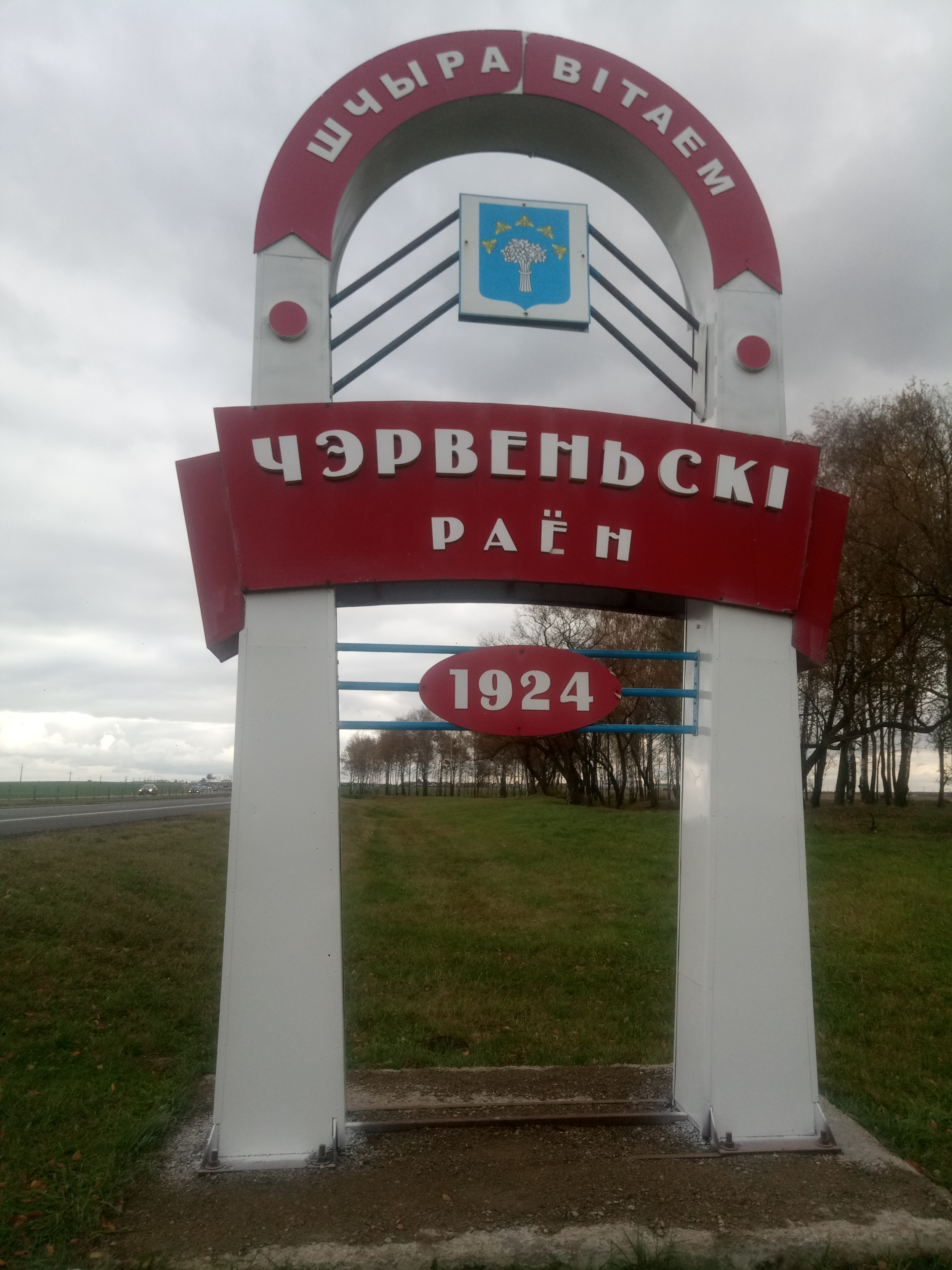 Червенский район